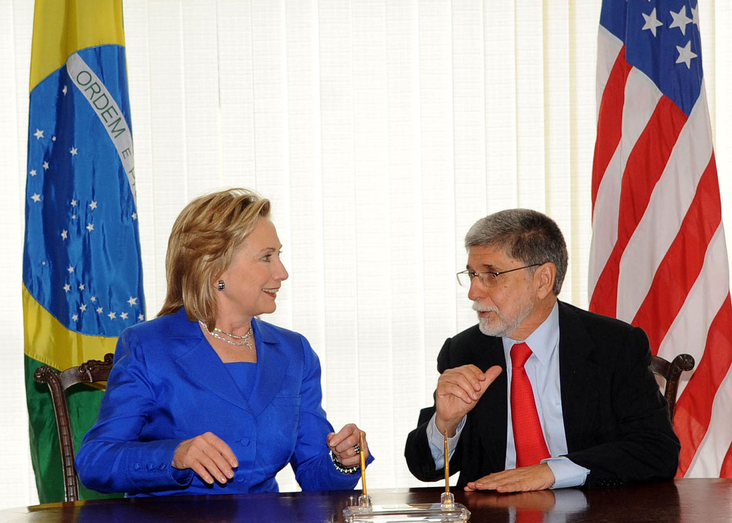 Brasília - O ministro das Relações Exteriores, Celso Amorim, recebe a secretária de Estado norte-americana, Hillary Clinton, no Palácio do Itamaraty